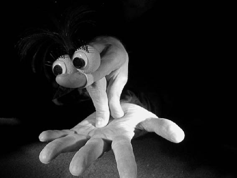 festival marrionnettissimo